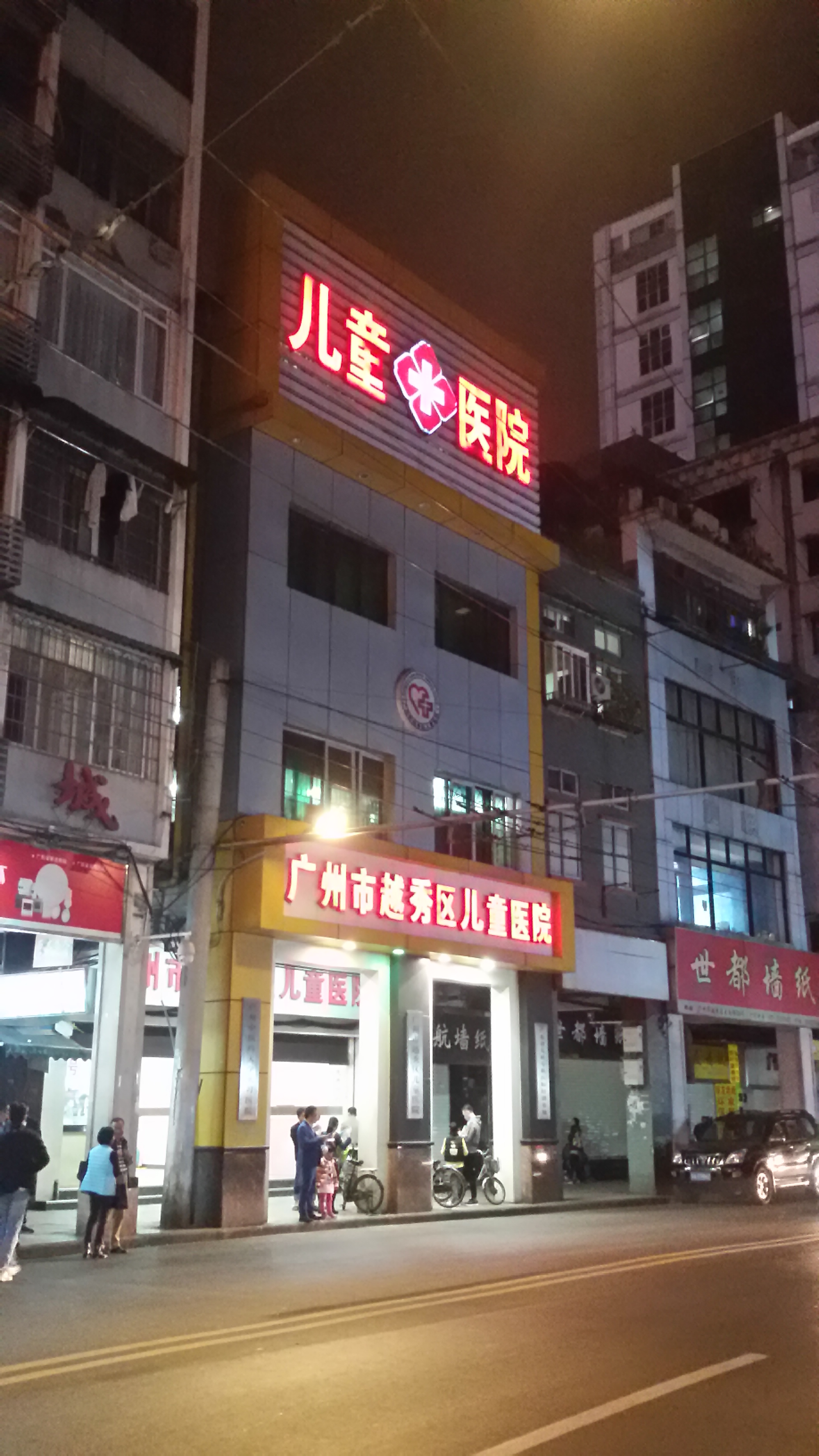 粵語: 越秀区儿童医院